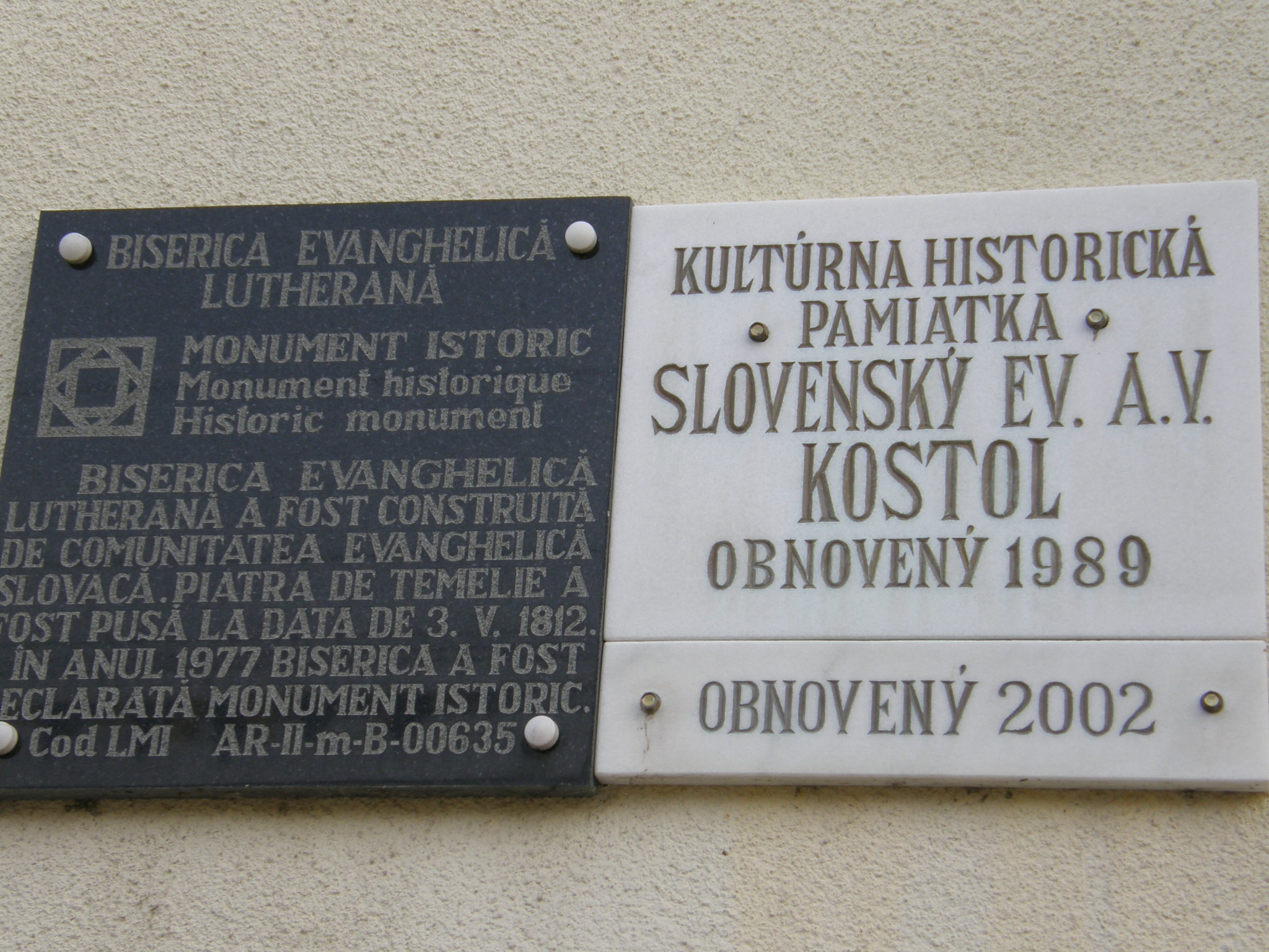 historická památka na evangelickém kostele